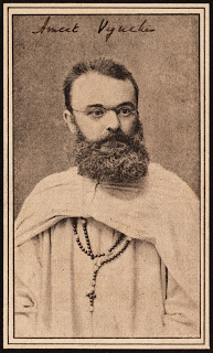 Amaat Vyncke (1850-1888), voortrekker in de Vlaamse beweging en missionaris in Kongo